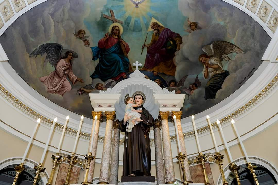 foto affresco